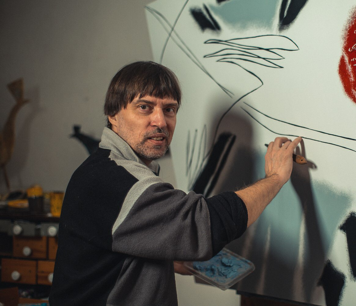 Олигеров А.Р. в мастерской за работой